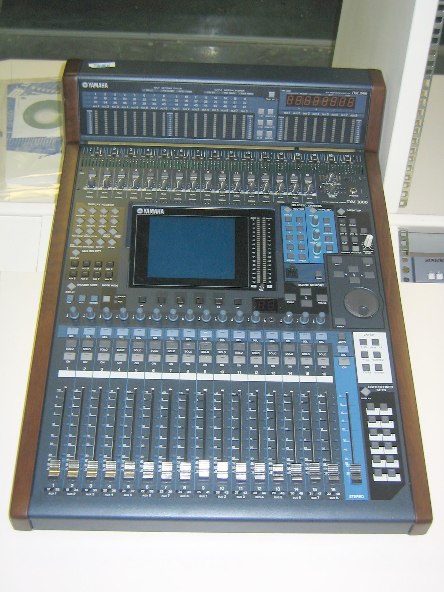 Mesa de audio marca Yamaha DM1000.